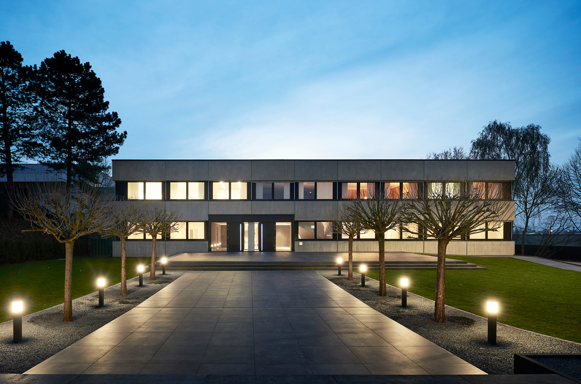 Poggenpohl Firmensitz in Herford (2019)